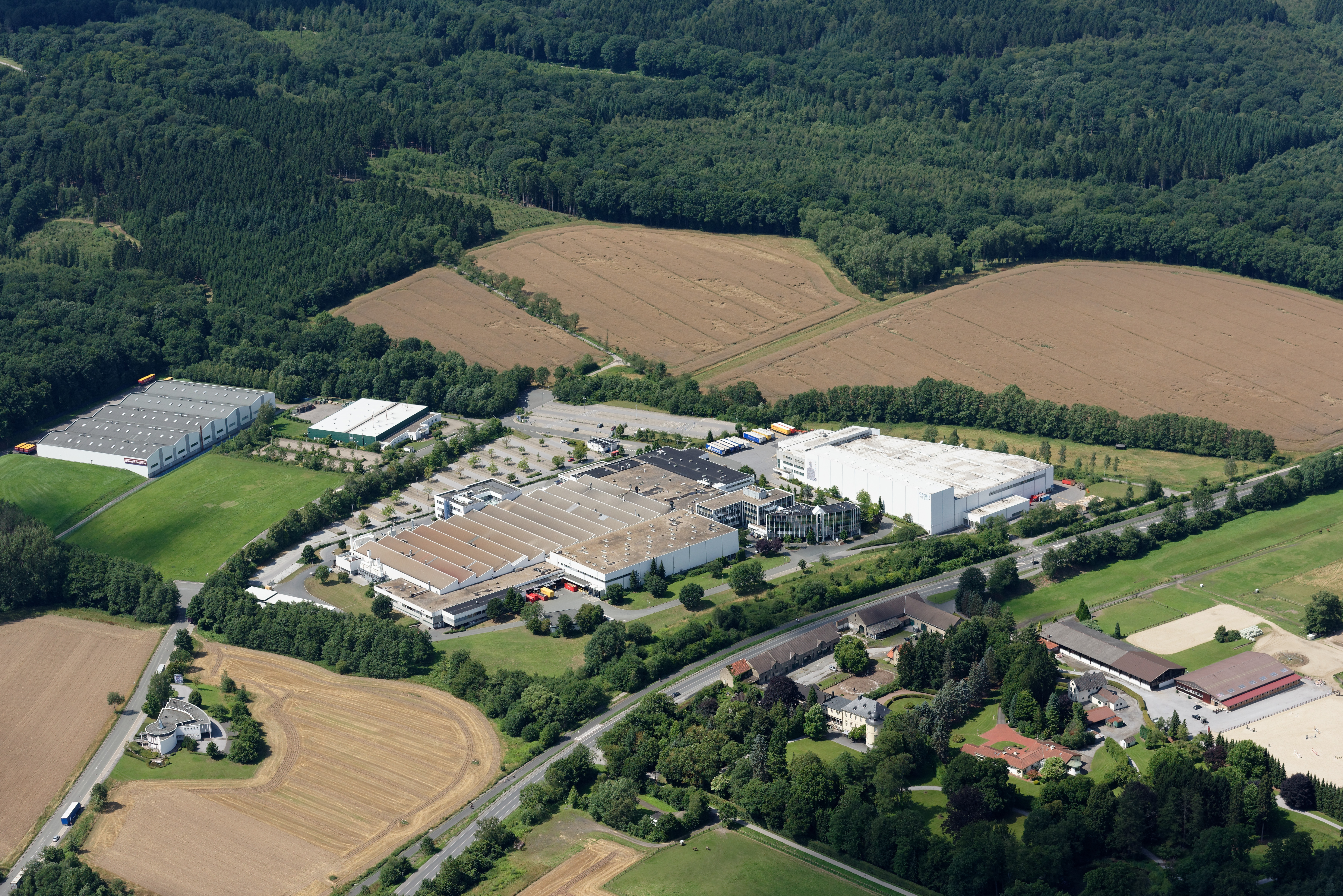 Luftaufnahme: Bundesstraße 7 in Hemer, Nordrhein-Westfalen; rechts Edelburg mit Reitanlage, links Gewerbegebiet u.a. mit Grohe-Werk und -Logistikzentrum, oben Waldbereich im Stadtgebiet Menden